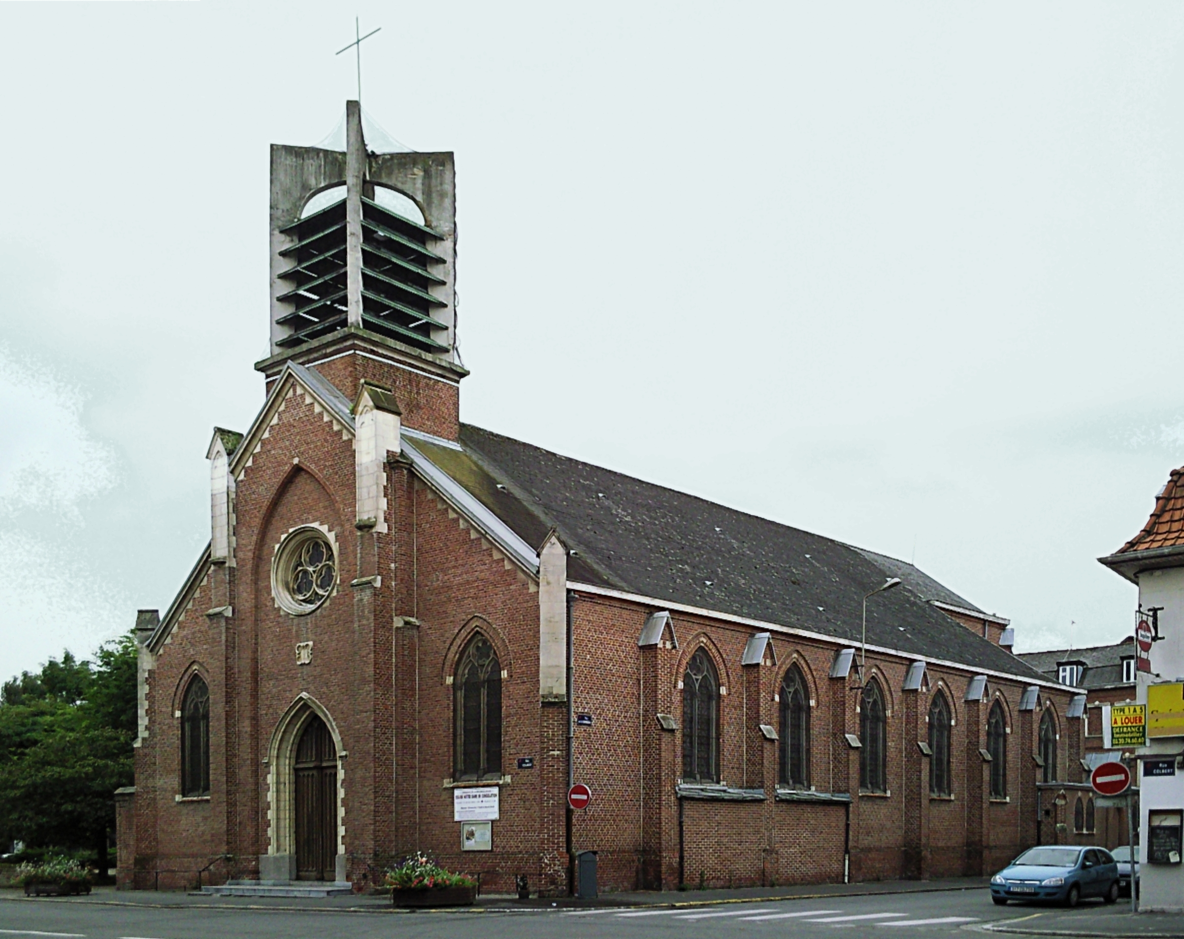 Eglise Notre-Dame-de-Consolation (1858) dans le quartier Vauban-Esquermes à Lille (Nord)